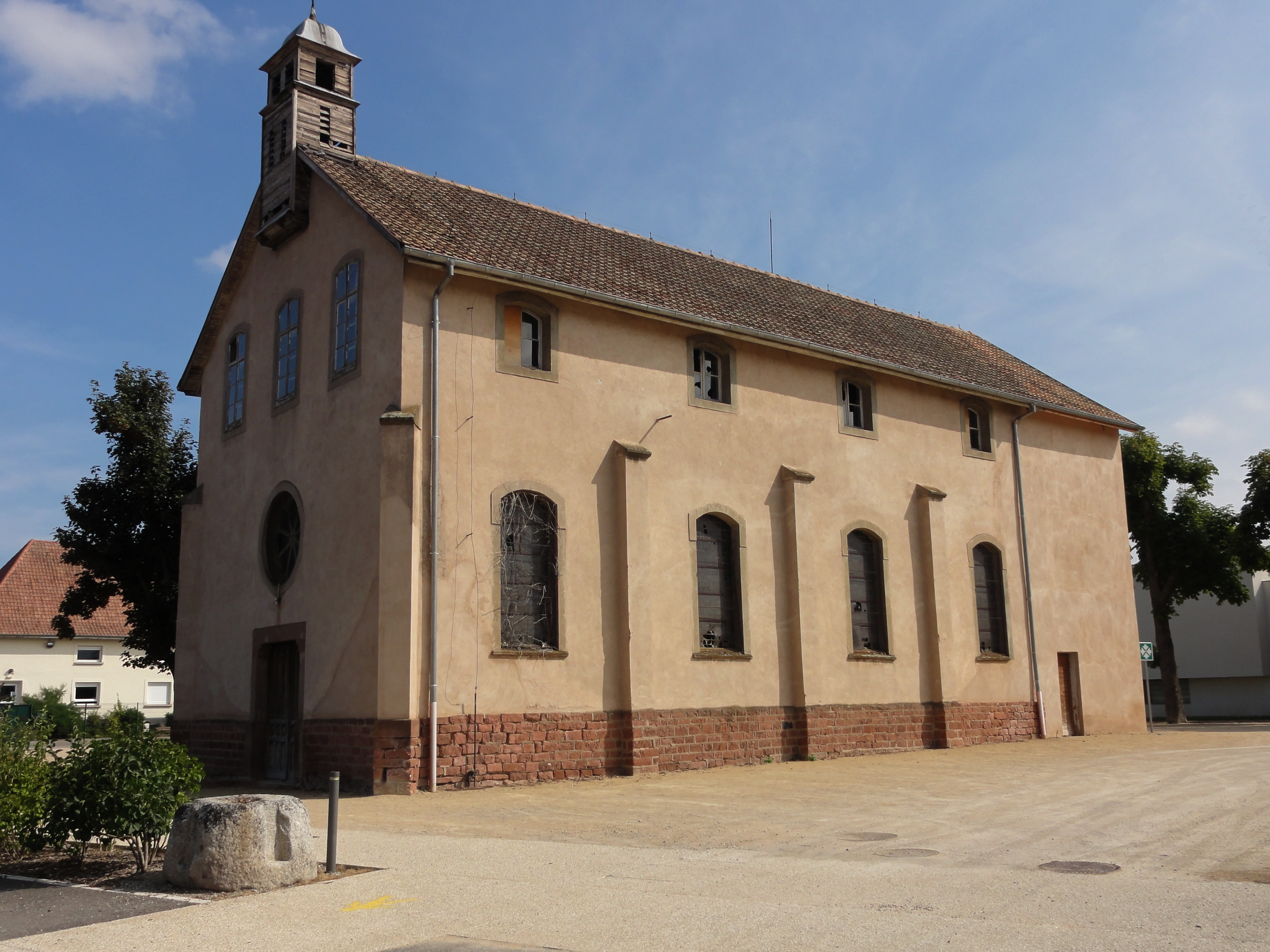 Alsace, Bas-Rhin, Scherwiller, Chapelle de l'Alumnat Sainte-Odile (XXe): L'Alumnat Ste Odile a ouvert ses portes en 1921 et les a définitivement fermées en 1976. Il fut par la suite occupé pendant une dizaine d'années par la communauté d'Emmaüs avant d'être finalement racheté par la commune de Scherwiller. Le bâtiment principal excepté la chapelle fut démoli en 2008, et un EHPAD y fut construit. Explications sur le site.